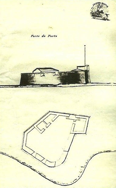 Alçado e Planta do Forte de Santa Cruz, Praia da Vitória, ilha Terceira, Açores: Forte do Porto, s/d, autor desconhecido, Arquivo Histórico Militar, Lisboa. in MARTINS, José Salgado, "Património Edificado da Ilha Terceira: o Passado e o Presente". Separata da "Atlântida", vol. LII, 2007. p. 52.